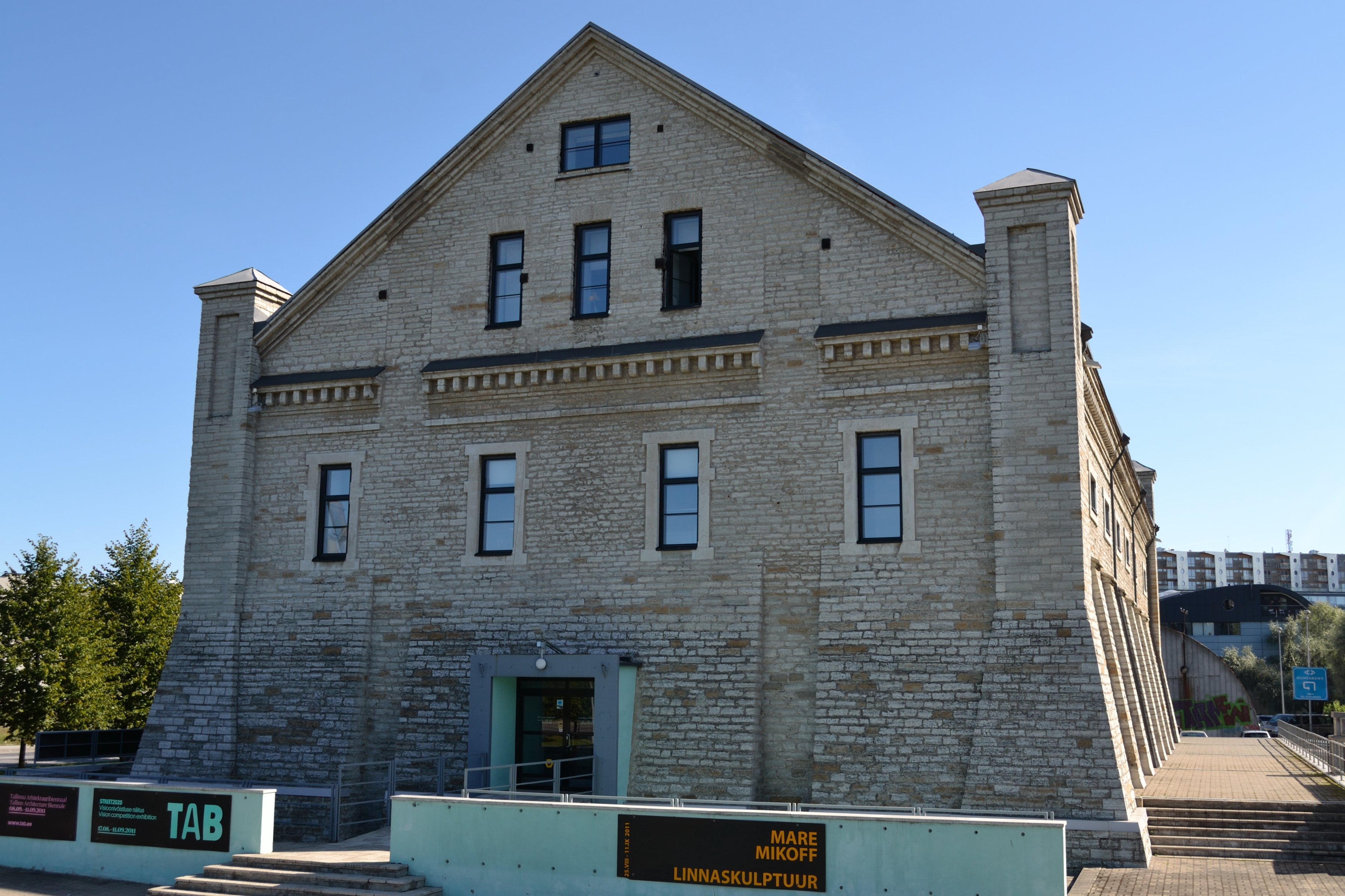 Tallinn, Rotermanni vabriku soolaladu, 1908